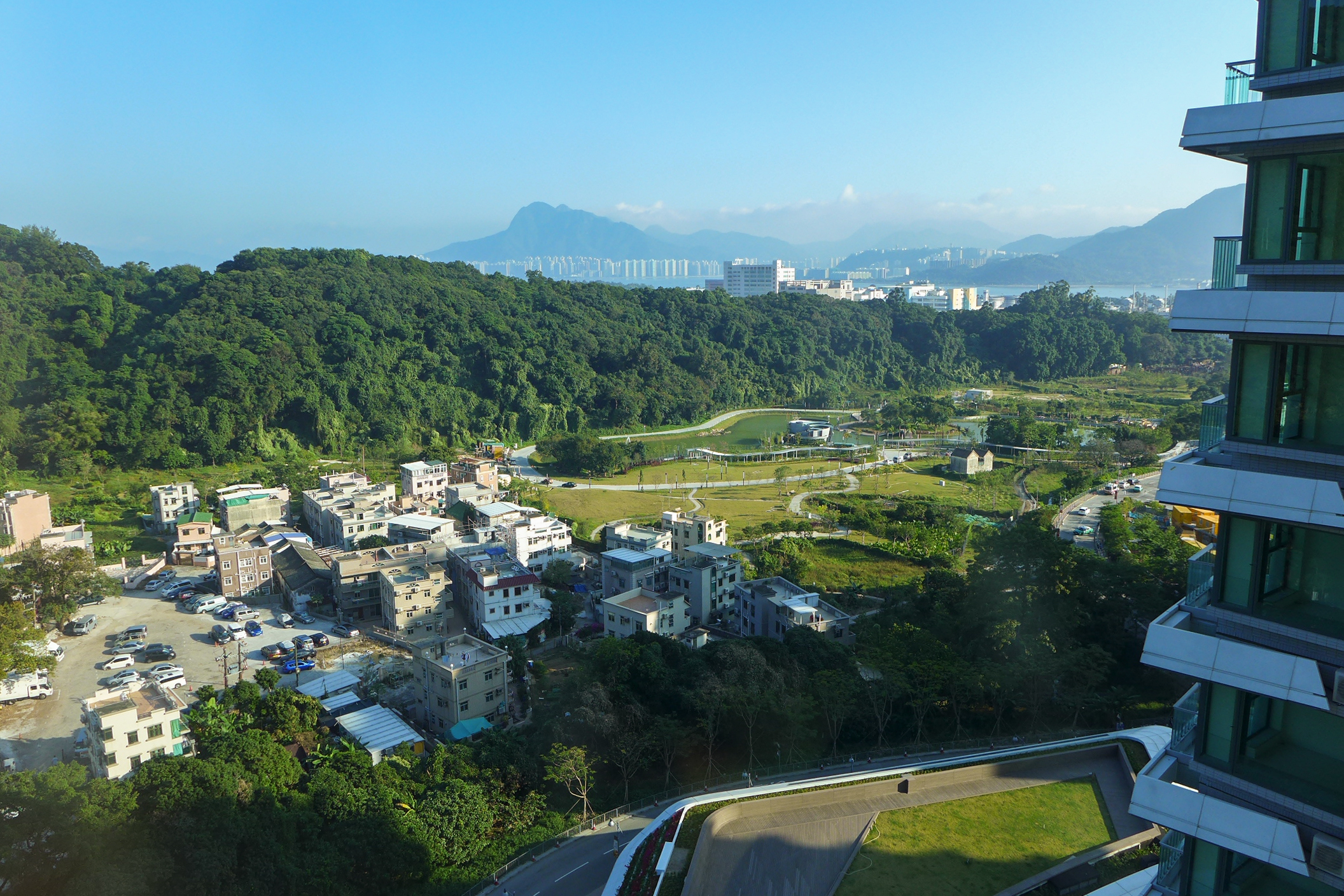 Fung Yuen